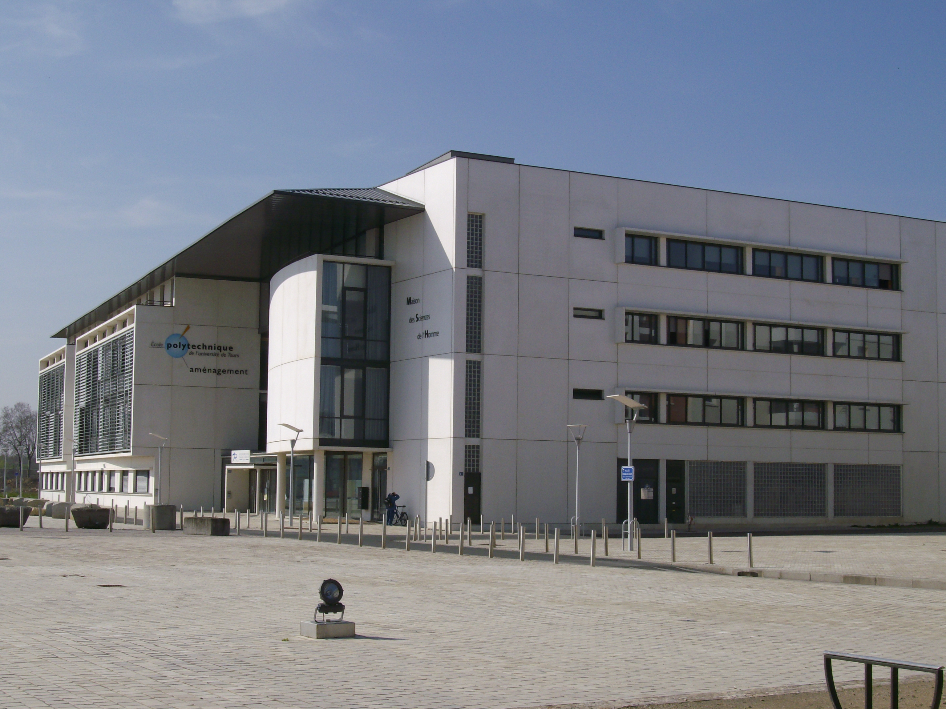 Département Aménagement de Polytech' Tours aux Deux-Lions. Construit en 2004.